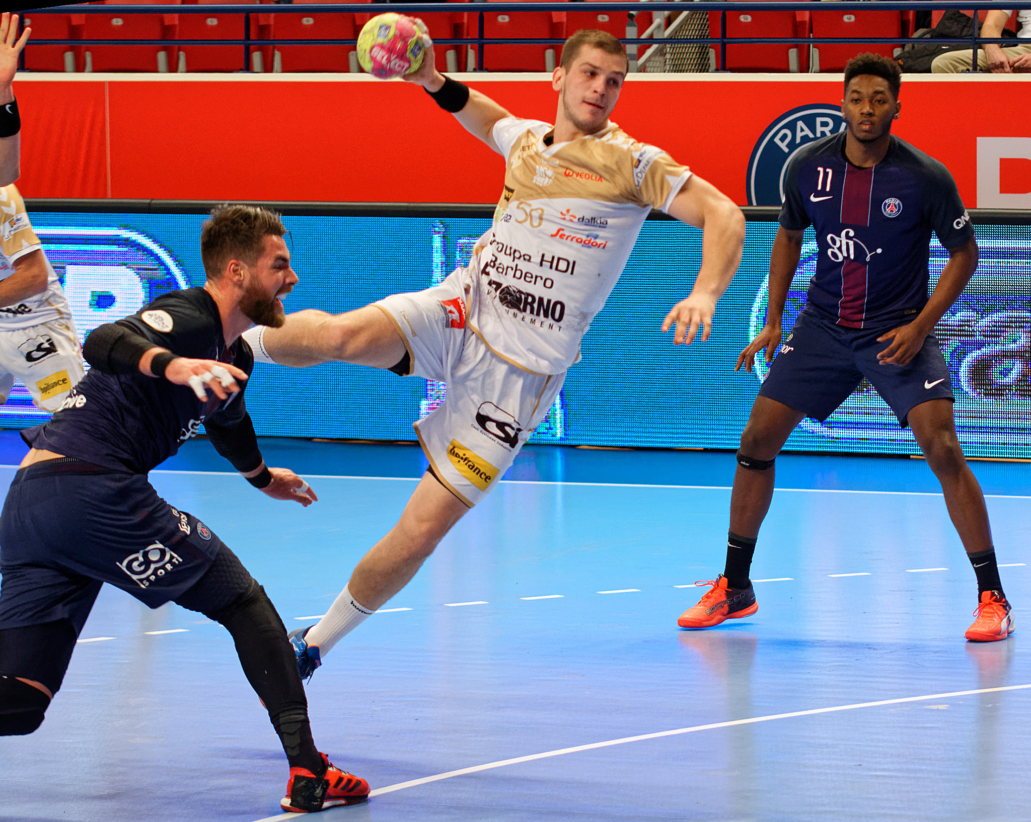 Rencontre de championnat de LidlStarLigue entre le PSG et St Raphaël. A Coubertin, le 8 décembre 2016.